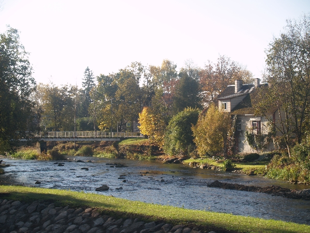 Põltsamaa